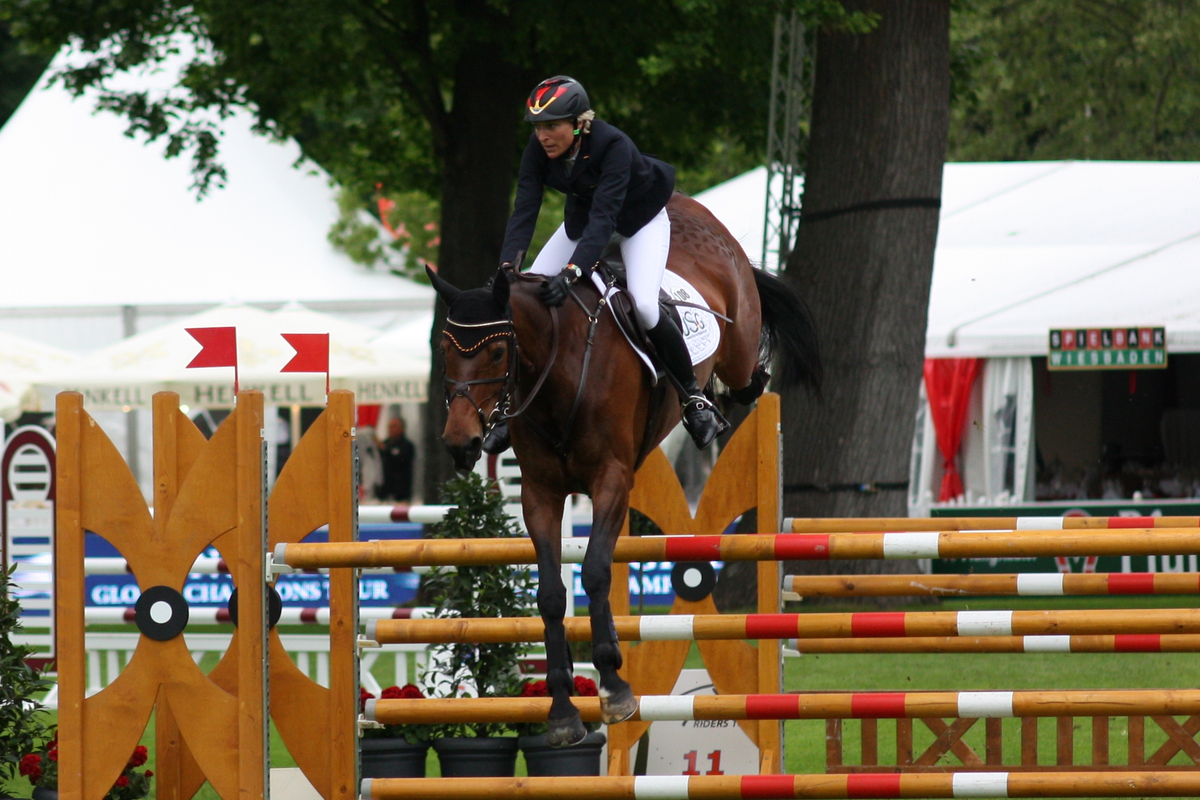 77. Internationanles Wiesbadener Pfingstunier 2013, CIC *** Vielseitigkeitsprüfung Springen, Ingrid Klimke auf FRH Escada JS Personality rights warning Although this work is freely licensed or in the public domain, the person(s) shown may have rights that legally restrict certain re-uses unless those depicted consent to such uses. In these cases, a model release or other evidence of consent could protect you from infringement claims.